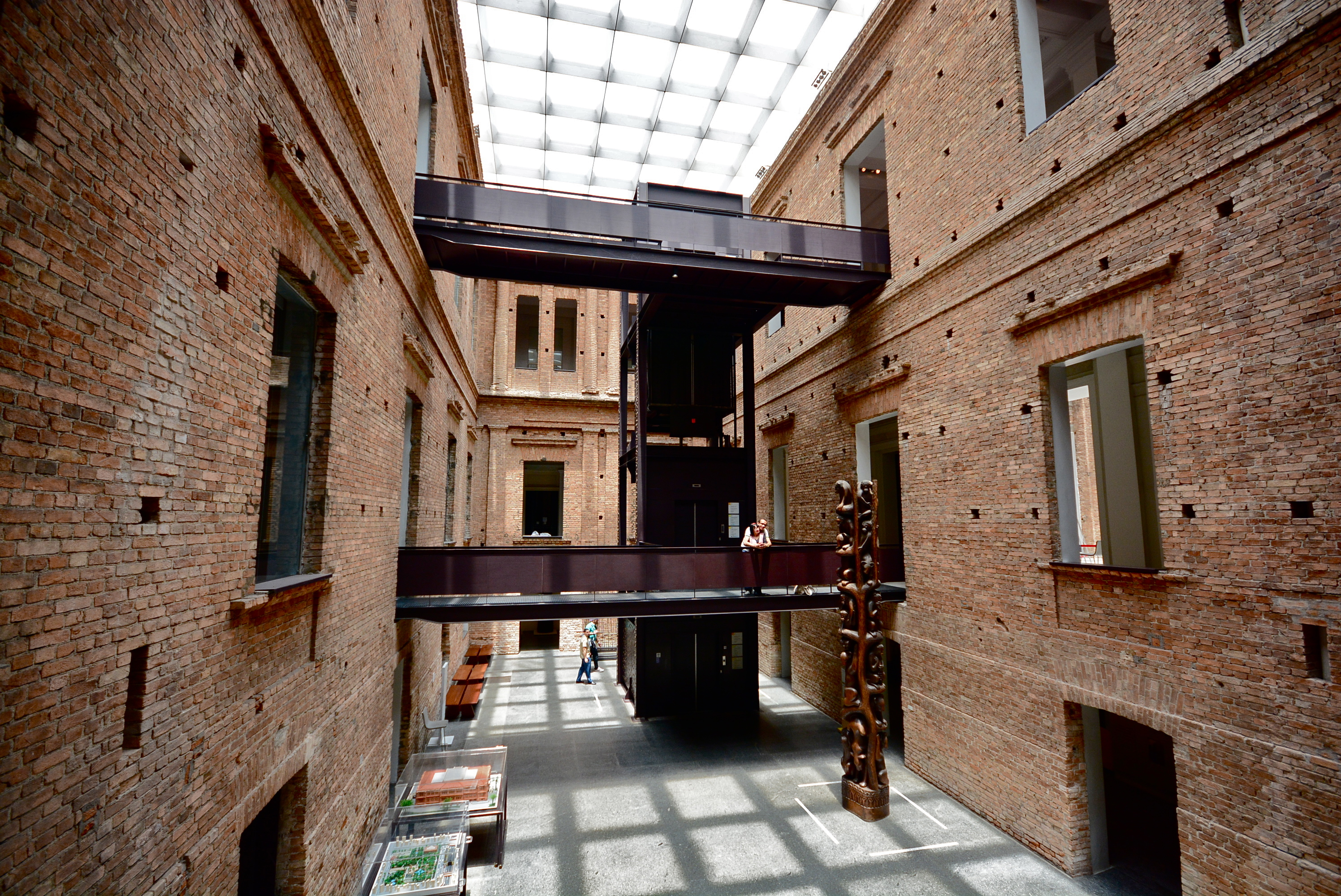 Pinacoteca do Estado